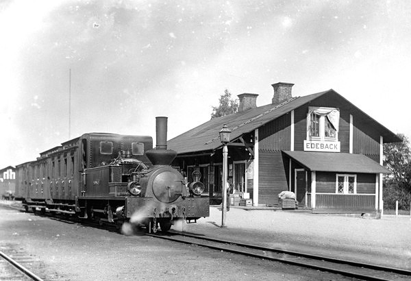 Edebäcks järnvägsstation vid Nordmark-Klarälvens Järnvägar.